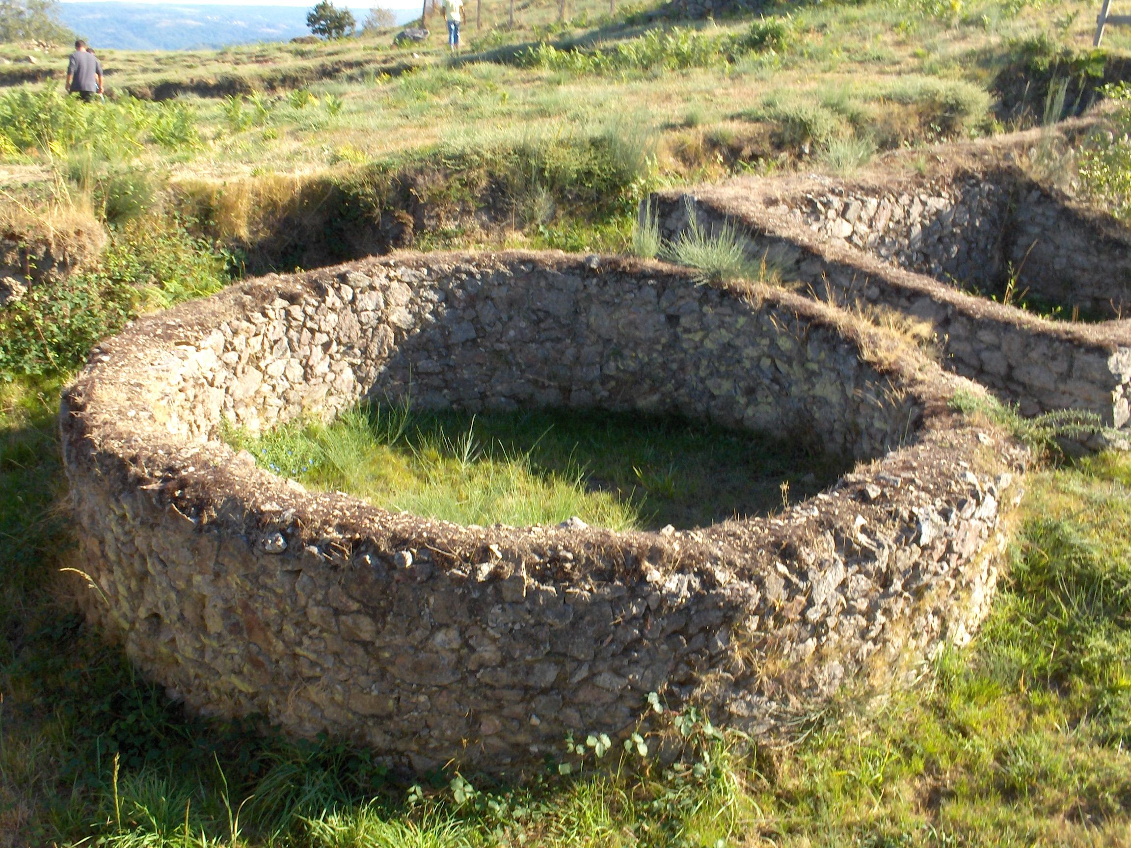 Castromao, Celanova, Galiza